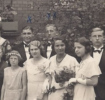 Hans-Helmut Schnelle (hinten Mitte) als Student auf einer Hochzeit